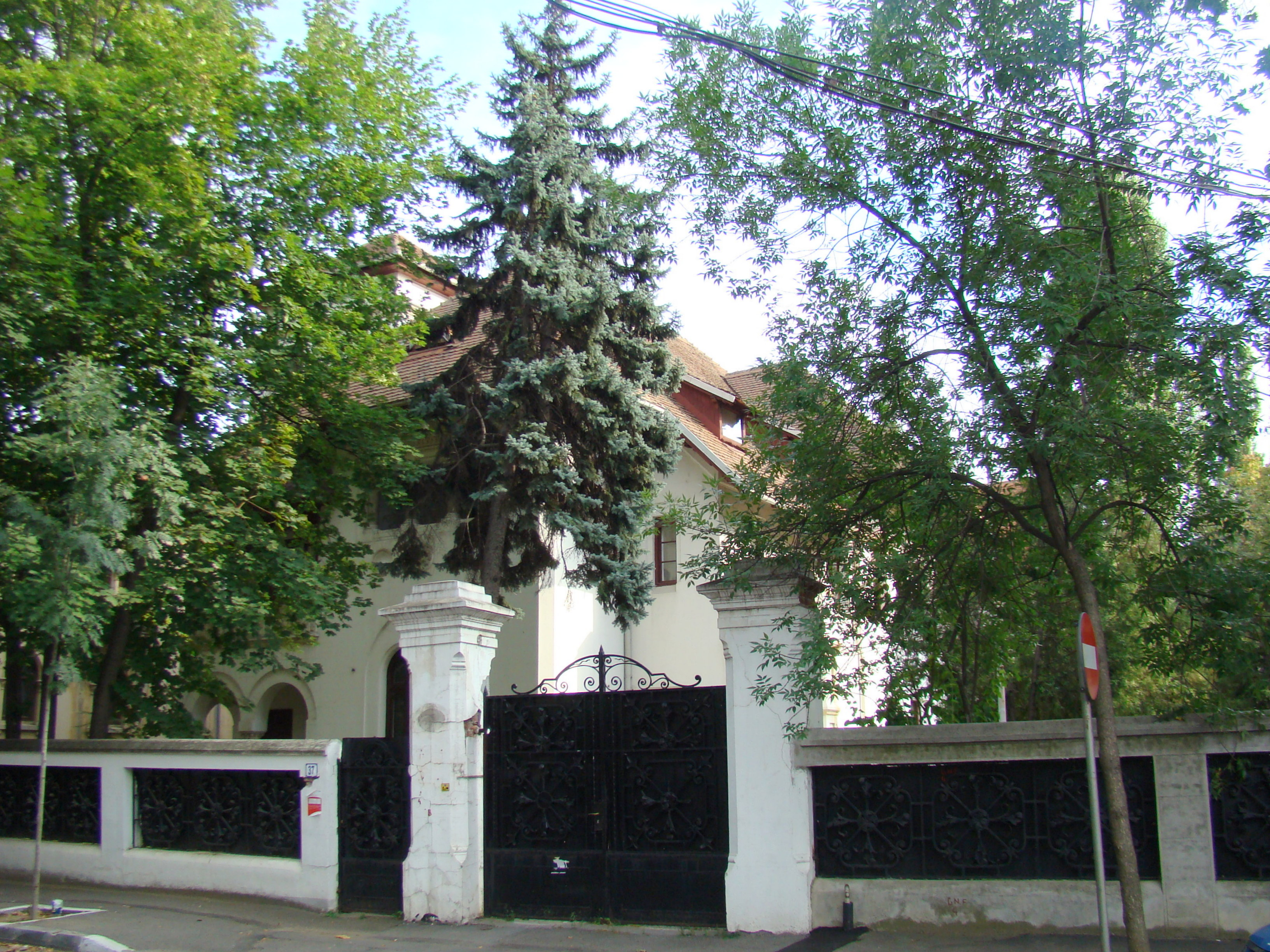 Casă monument istoric, str. Aleea Alexandru, nr. 37